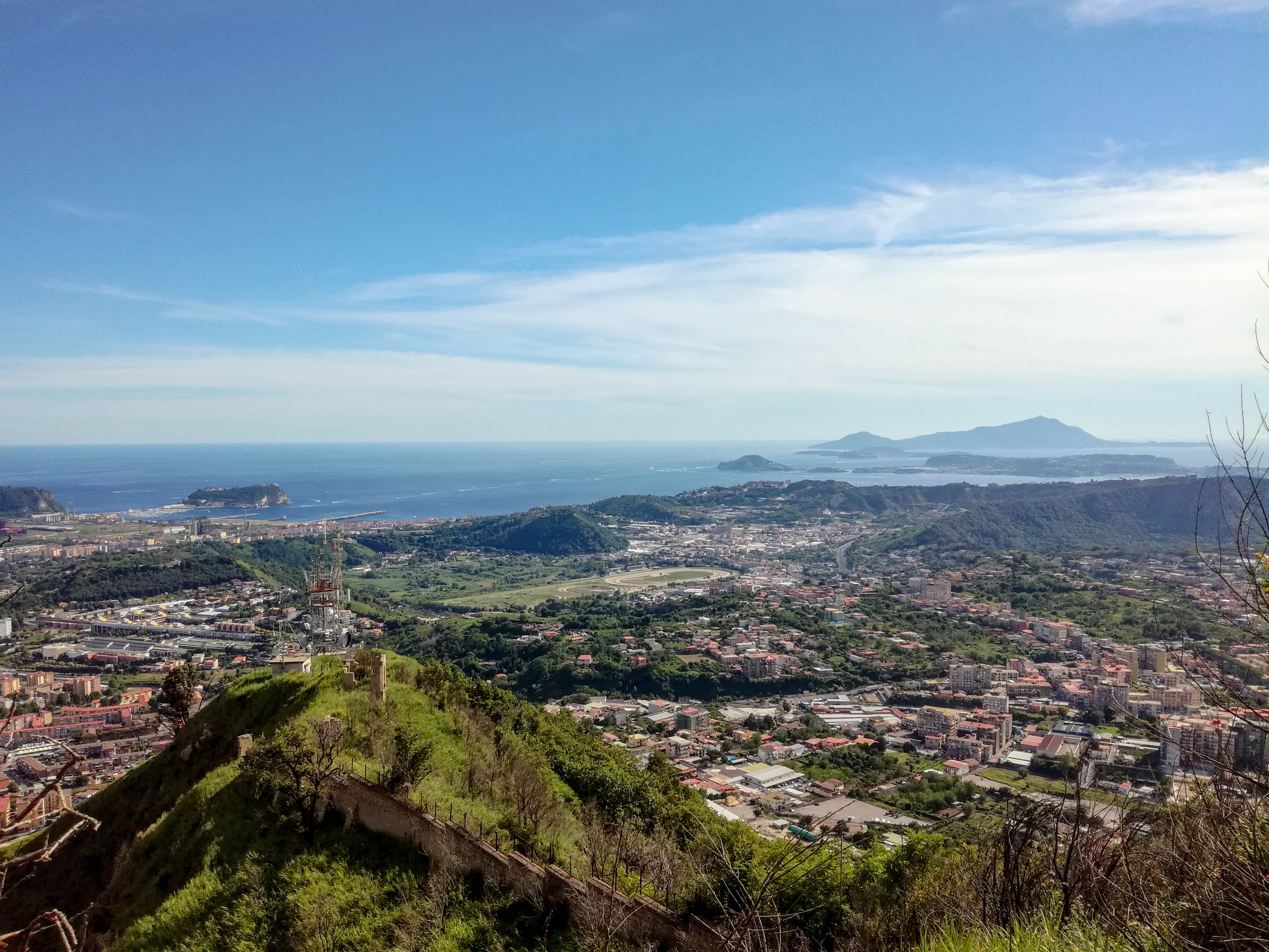 I Campi Flegrei dall'Eremo dei Camaldoli